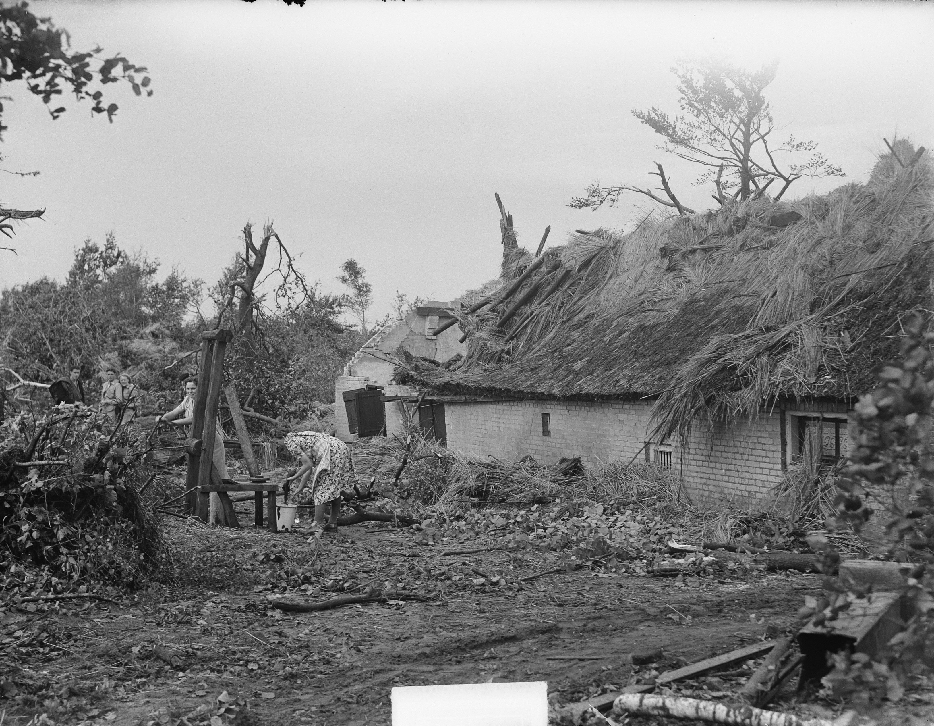 Collectie / Archief : Fotocollectie Anefo Reportage / Serie : [ onbekend ] Beschrijving : Windhoos op de veluwe Datum : 24 augustus 1950 Locatie : Gelderland, Veluwe Trefwoorden : windhozen Fotograaf : Nijs, Jac. de / Anefo Auteursrechthebbende : Nationaal Archief Materiaalsoort : Glasnegatief Nummer archiefinventaris : bekijk toegang 2.24.01.09 Bestanddeelnummer : 904-1487